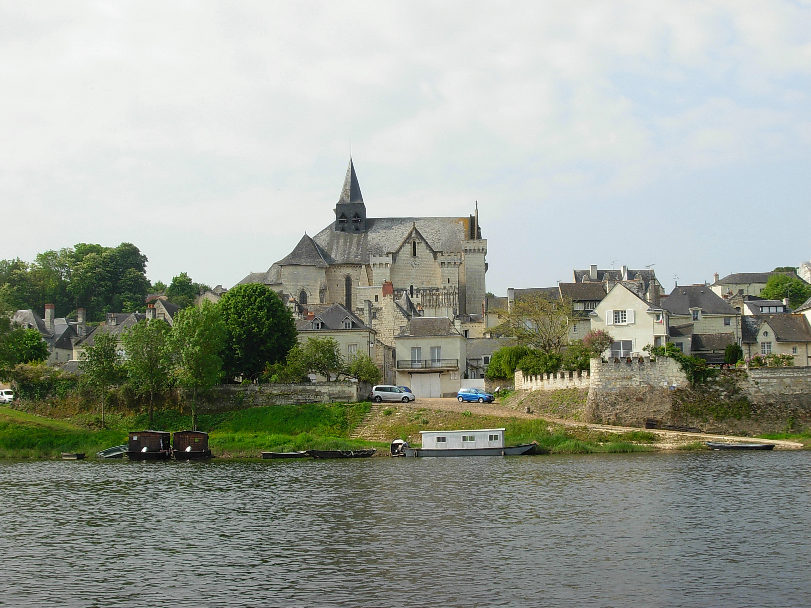 Vu de Candes-Saint-Martin (Indre-et-Loire, France) depuis la Loire.